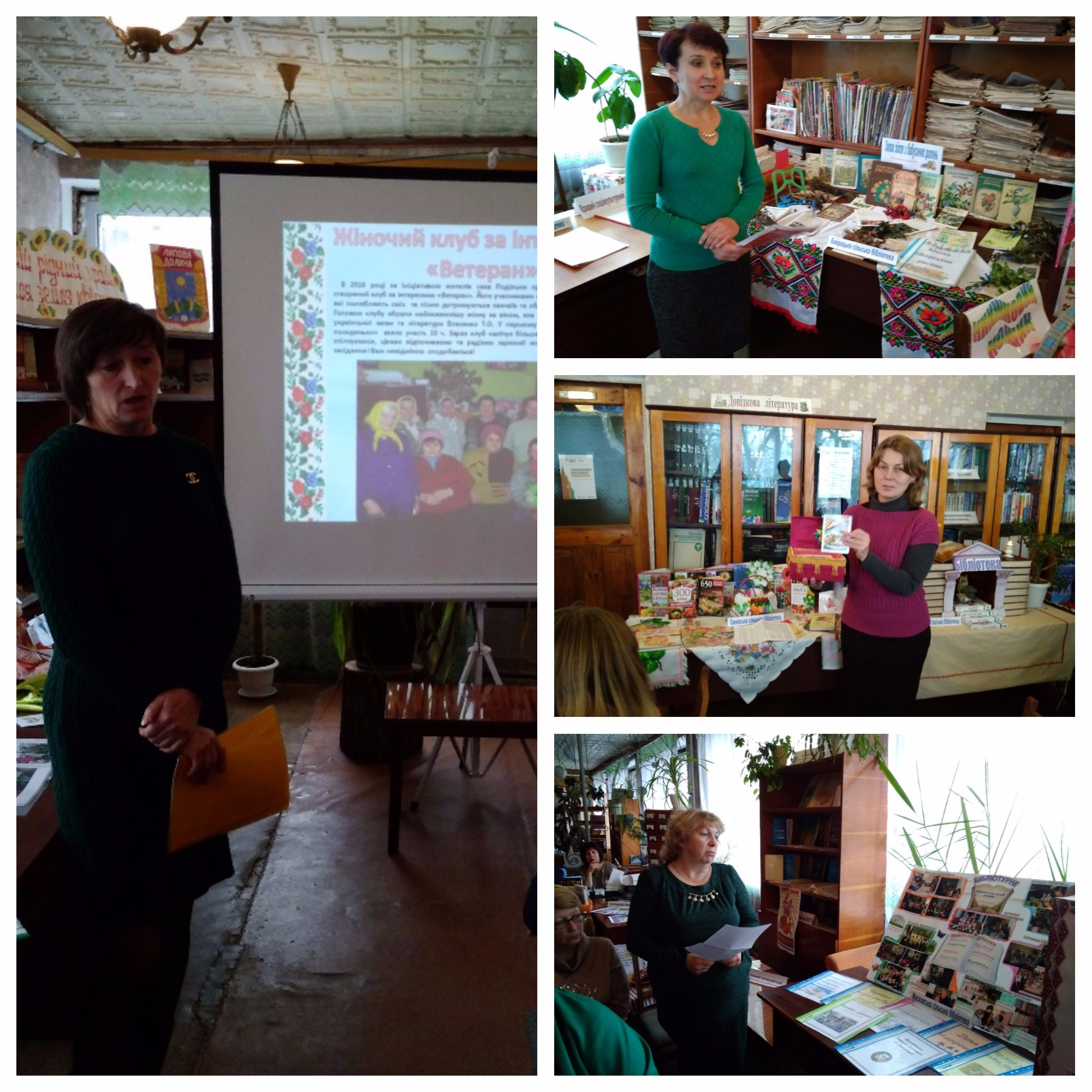 конкурс